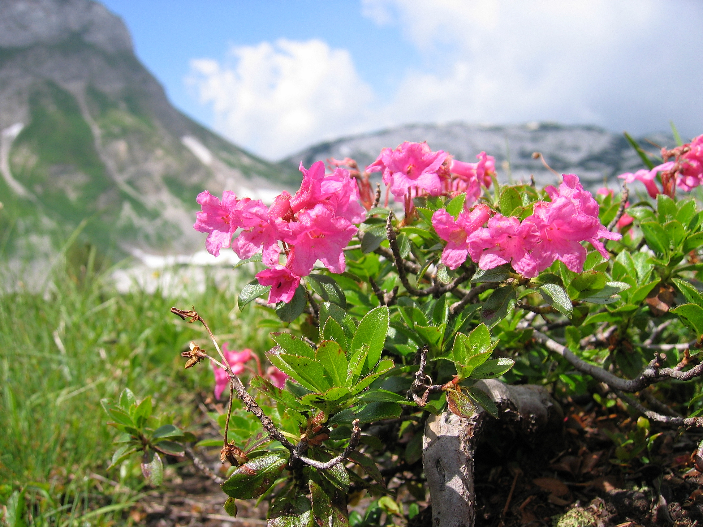 Rhododendron hirsutum, Totes Gebirge near Wildgössl, ~2000, Styria, Austria